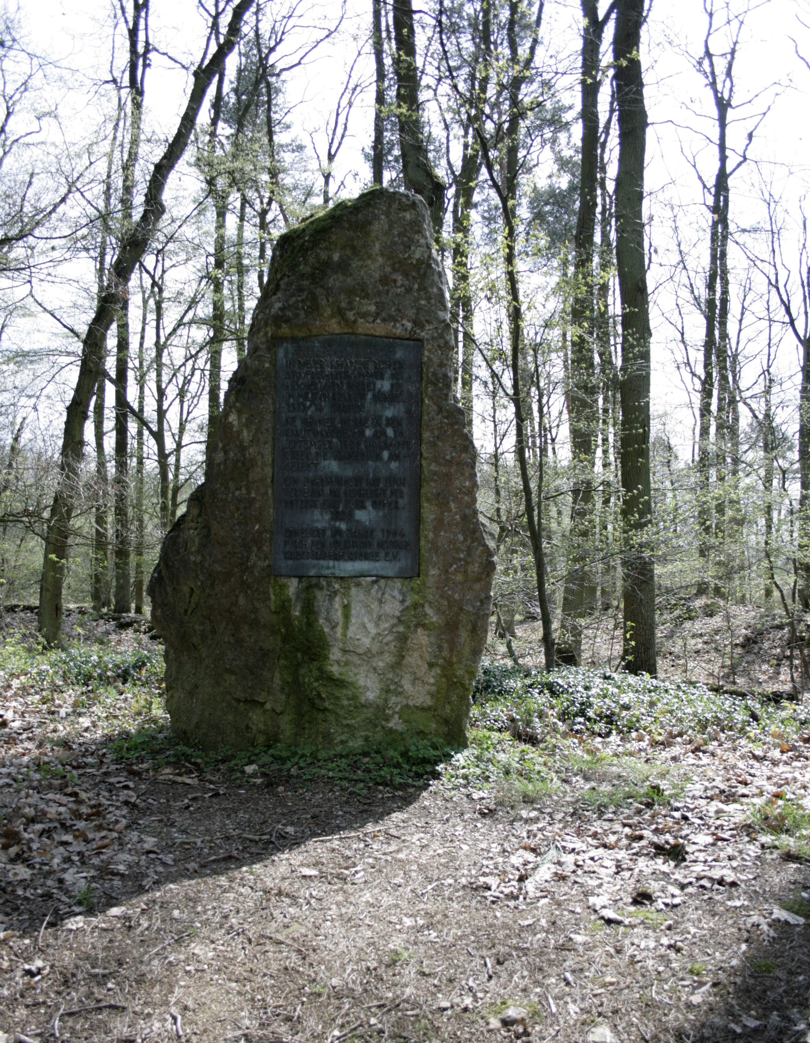 "Blücherschanze" bei Ennerich, Deutschland